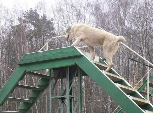 Дрессировка среднеазиатской овчарки